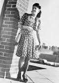 חיה זיידנברג (1926-1948)